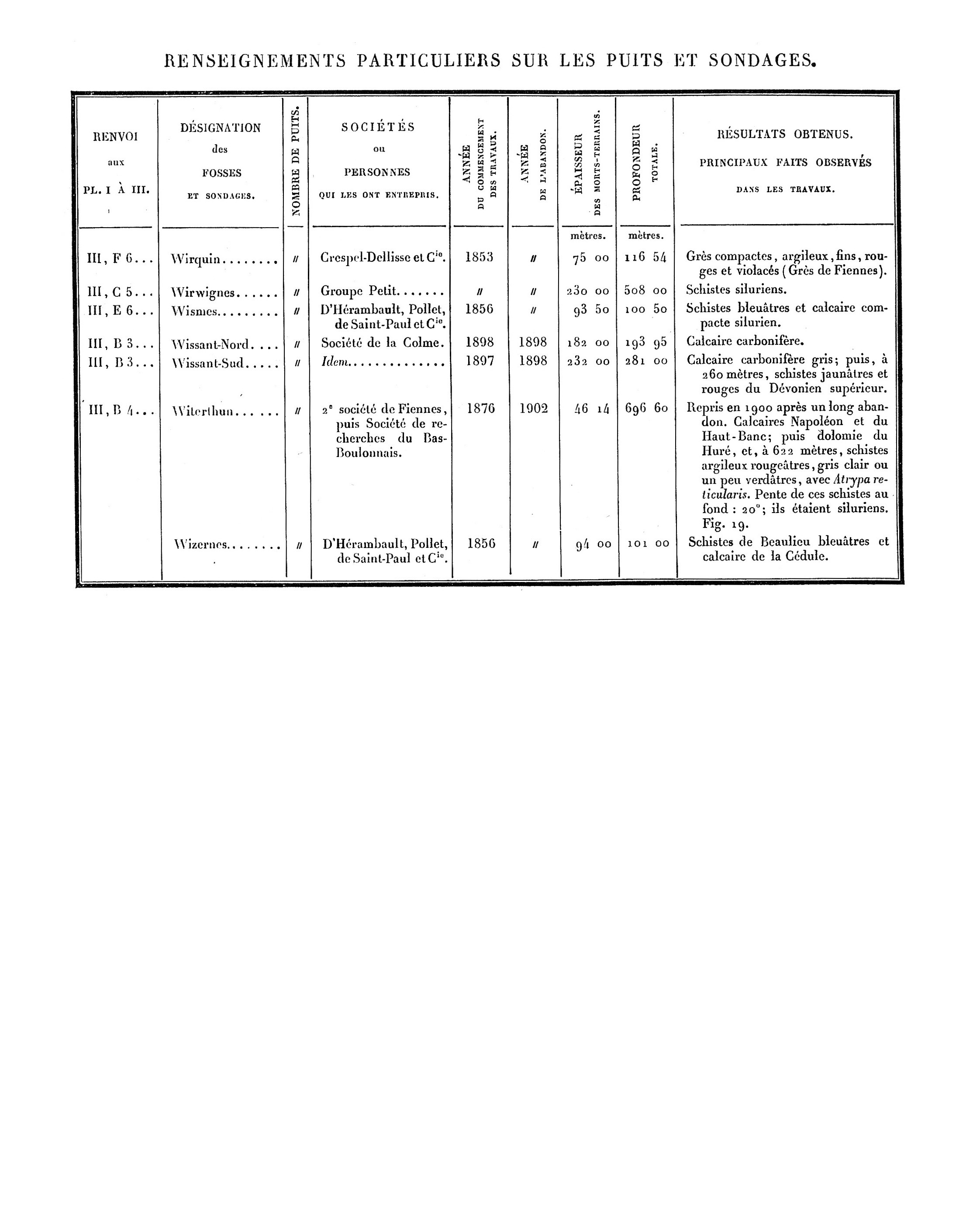 Liste des puits de mine et des sondages. Mines du Boulonnais. Document extrait de Étude des Gîtes Minéraux de la France. Topographie Souterraine du Bassin Houiller du Boulonnais ou Bassin d'Hardinghen, par A. Olry, ingénieur en chef des Mines. Chapitre IX, pages 172 à 189.